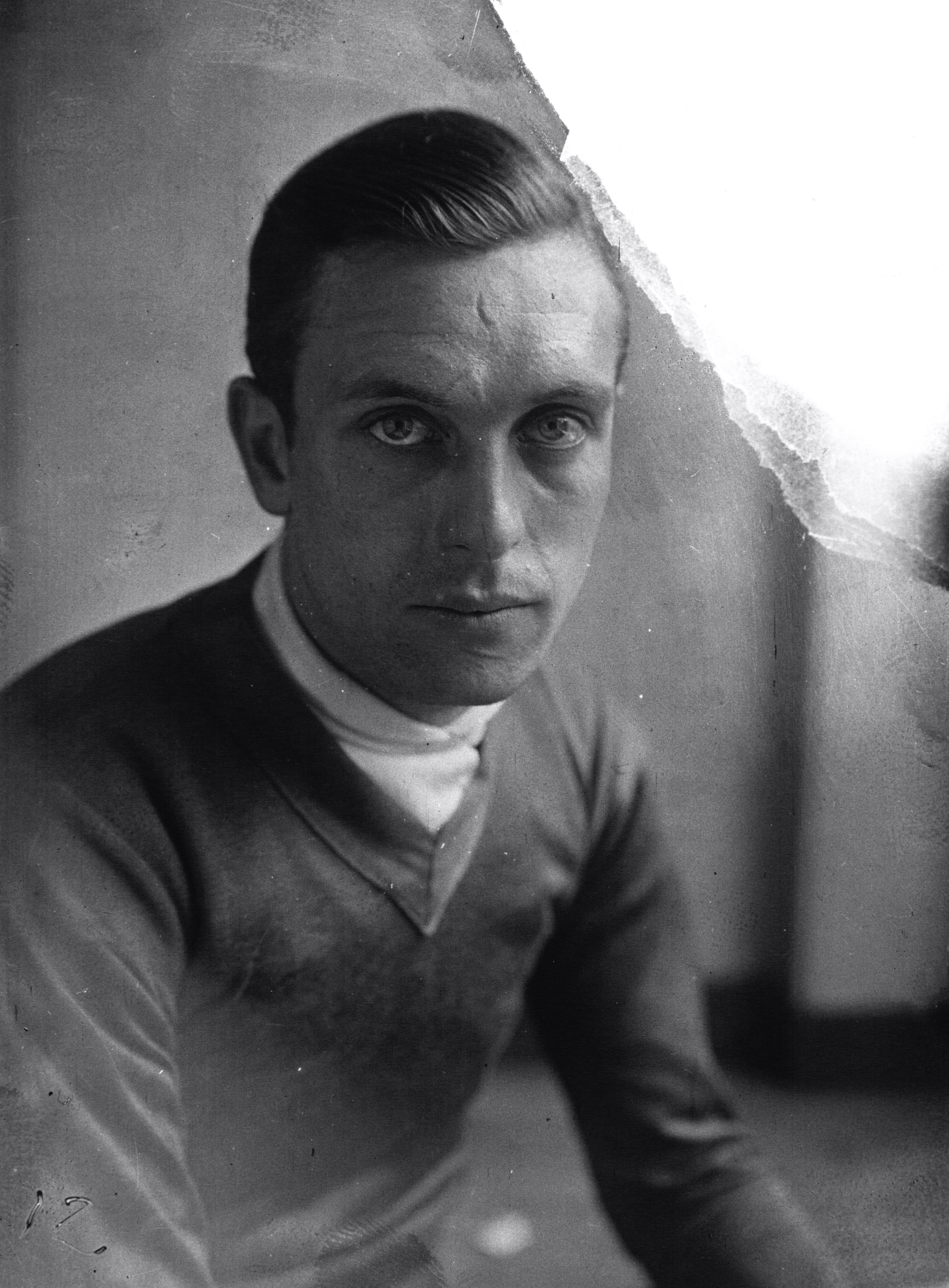 Jean Aerts lors du Tour de France 1929.